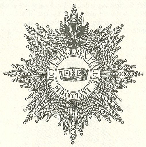 Scan van Blz.178 van het boek "Handbuch der Ritter- und Verdienstorden " uitgegeven 1893 door Weber.Tekening van de in 1902 overleden Maximilian Gritzner. Robert Prummel 10 jul 2008 16:40 (CEST)